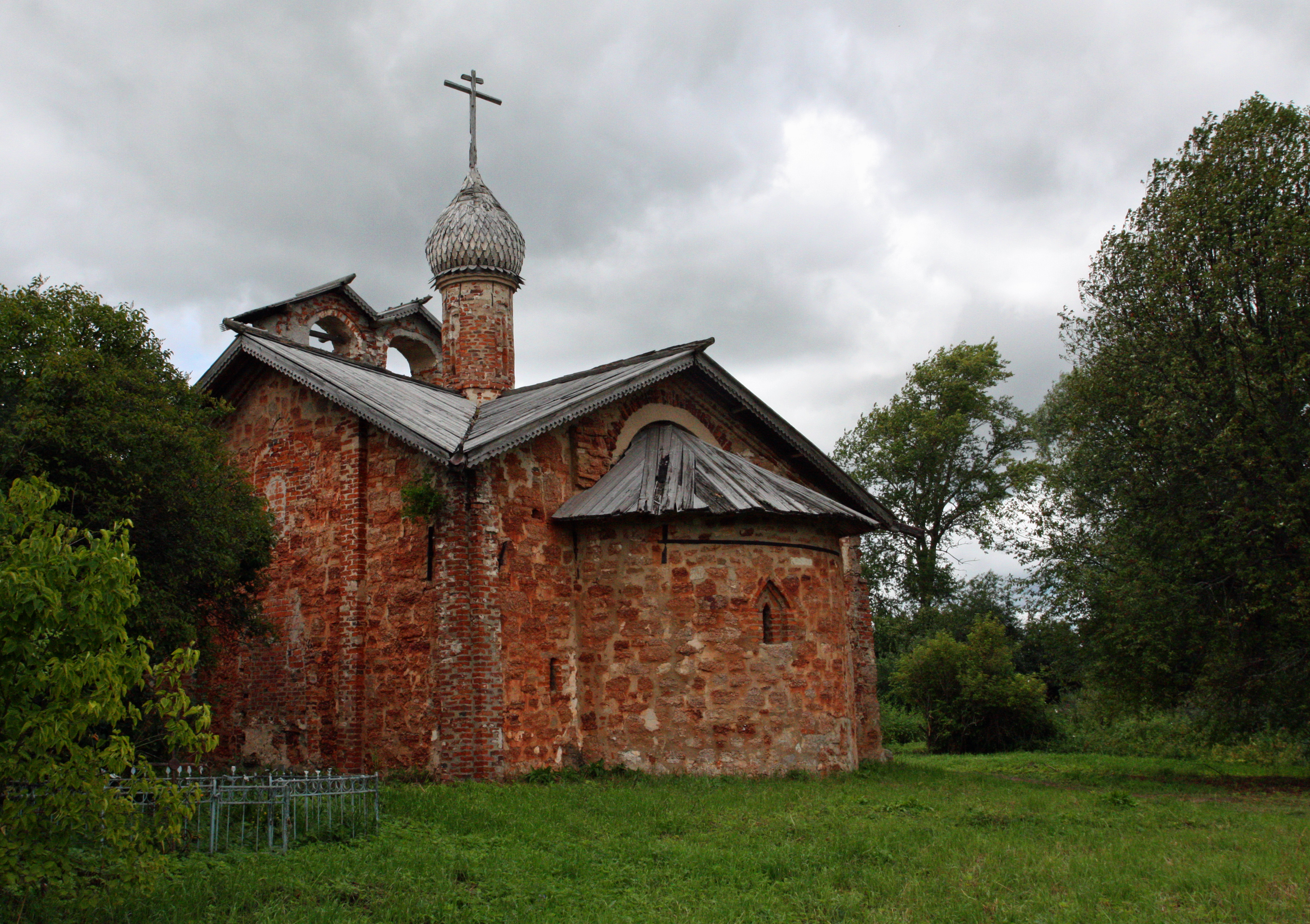 Церковь Иоанна Милостивого на Мячине: Воскресенская слобода, Великий Новгород, Новгородская область